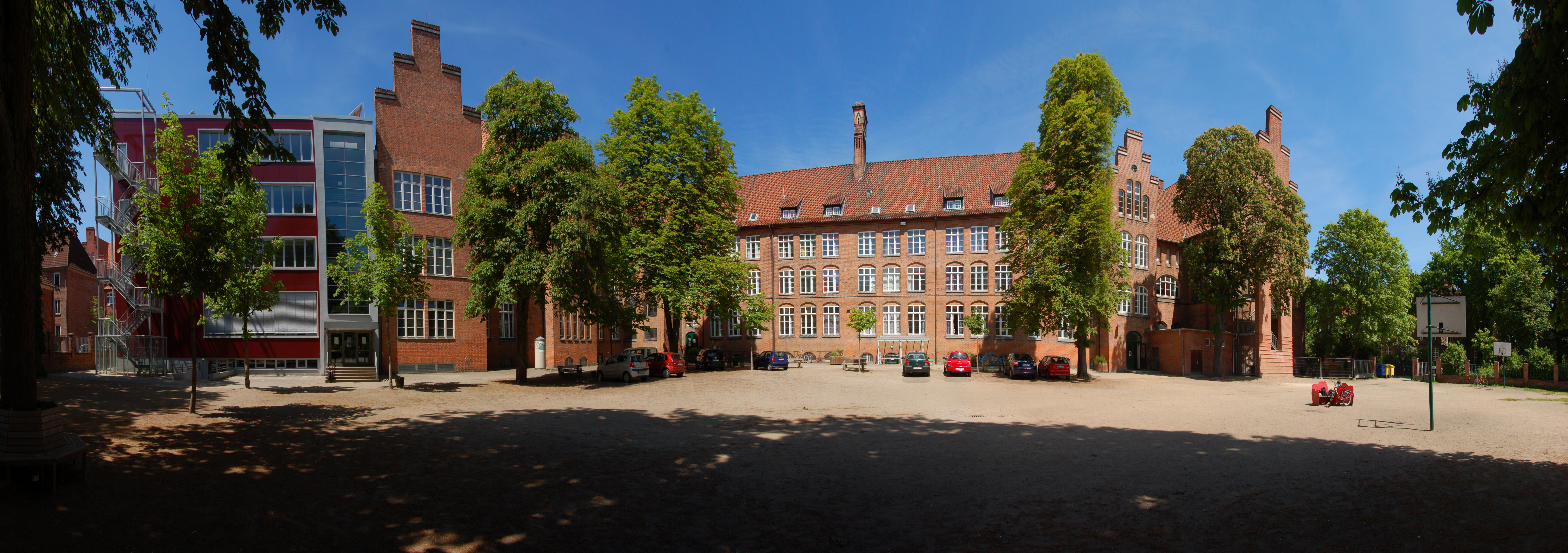 Wilhelm-Raabe-Schule (Gymnasium) in Lüneburg in Niedersachsen, Deutschland. Blick vom Schulhof auf das Schulgebäude von 1908, links der Anbau von 1970.